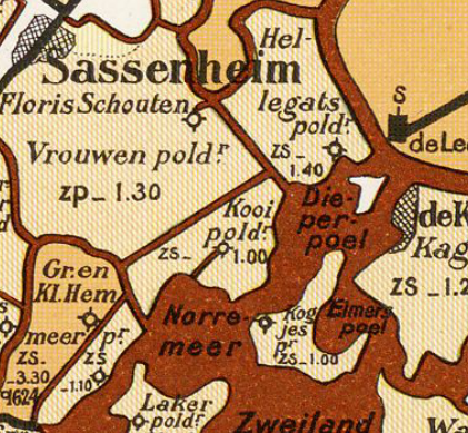 Kooipolder